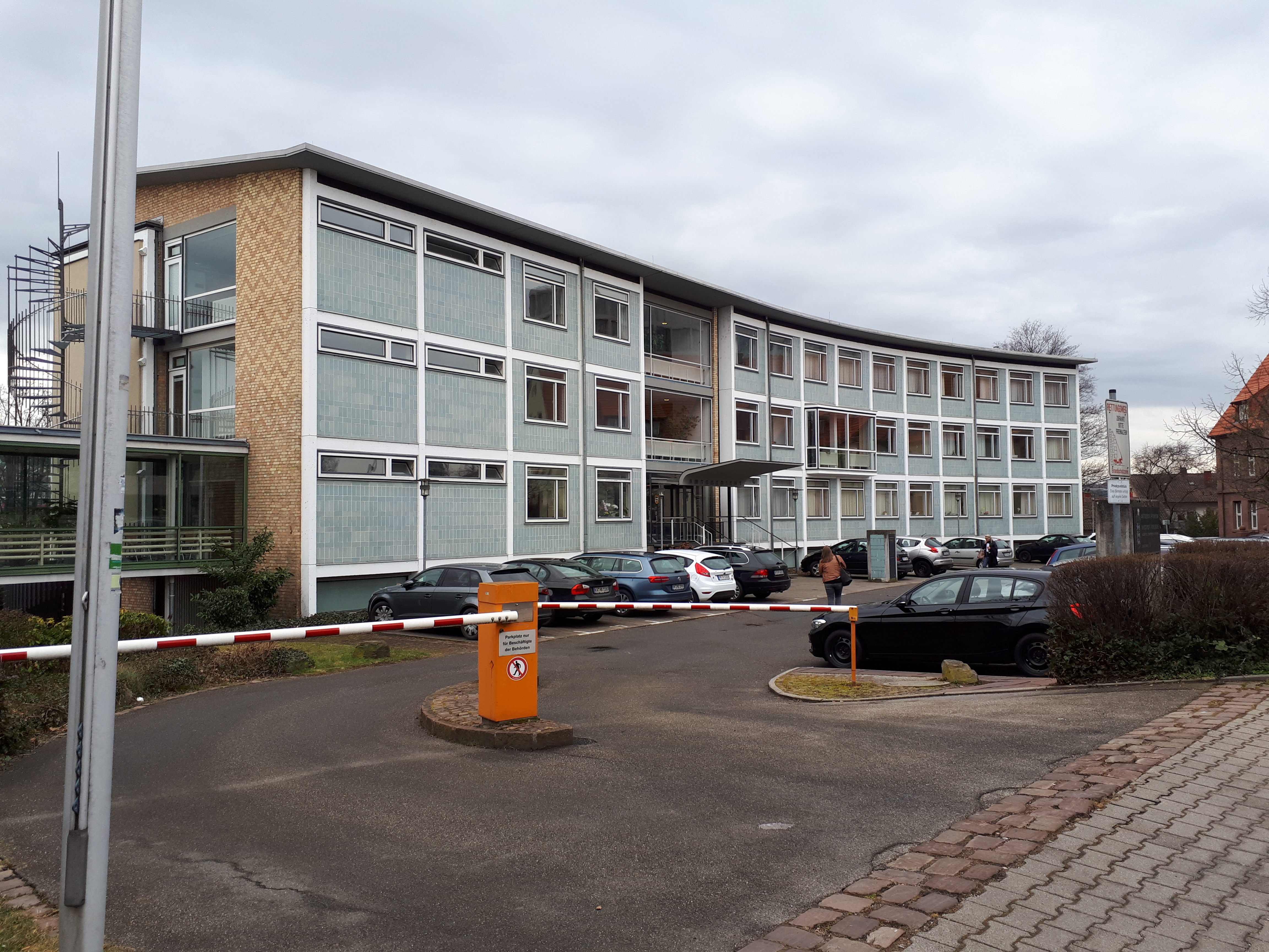 Gebäude des Amtsgericht Pforzheim in der Lindenstraße 8, Pforzheim